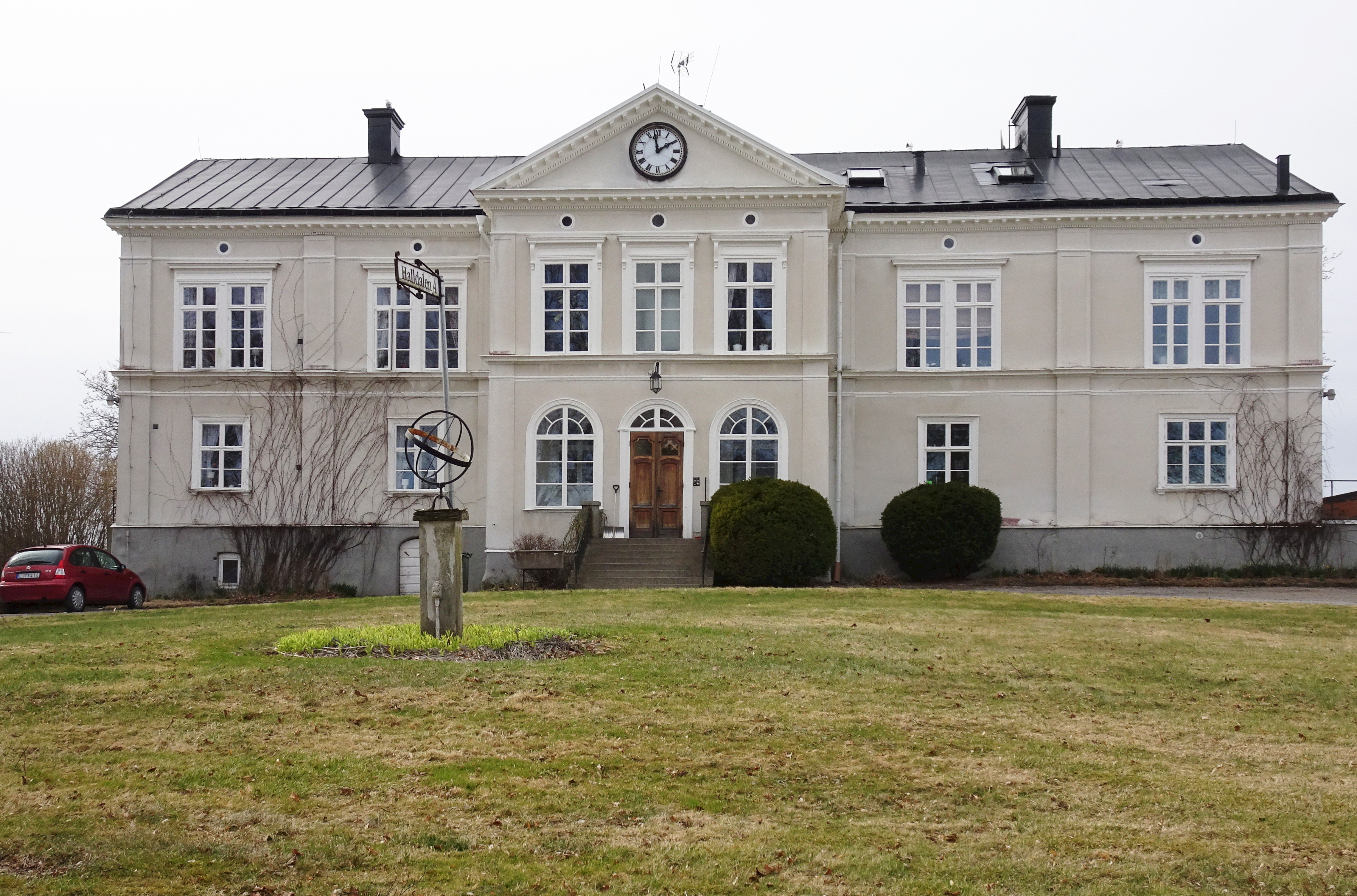 Halls herrgård, huvudbyggnad